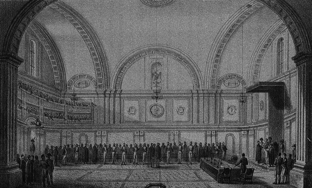 Litografía del Juramento de Iturbide; Emperador Constitucional de México (1822).